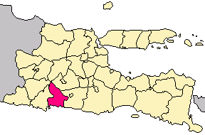 carte indonésienne